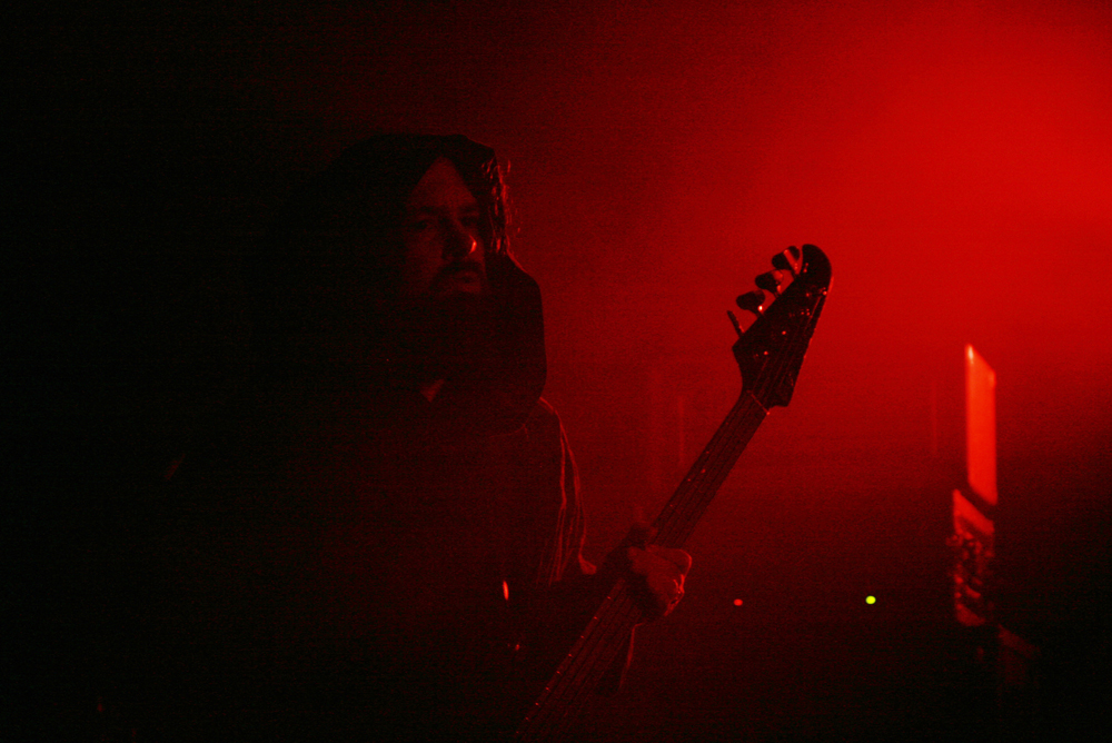 At Quart 2008